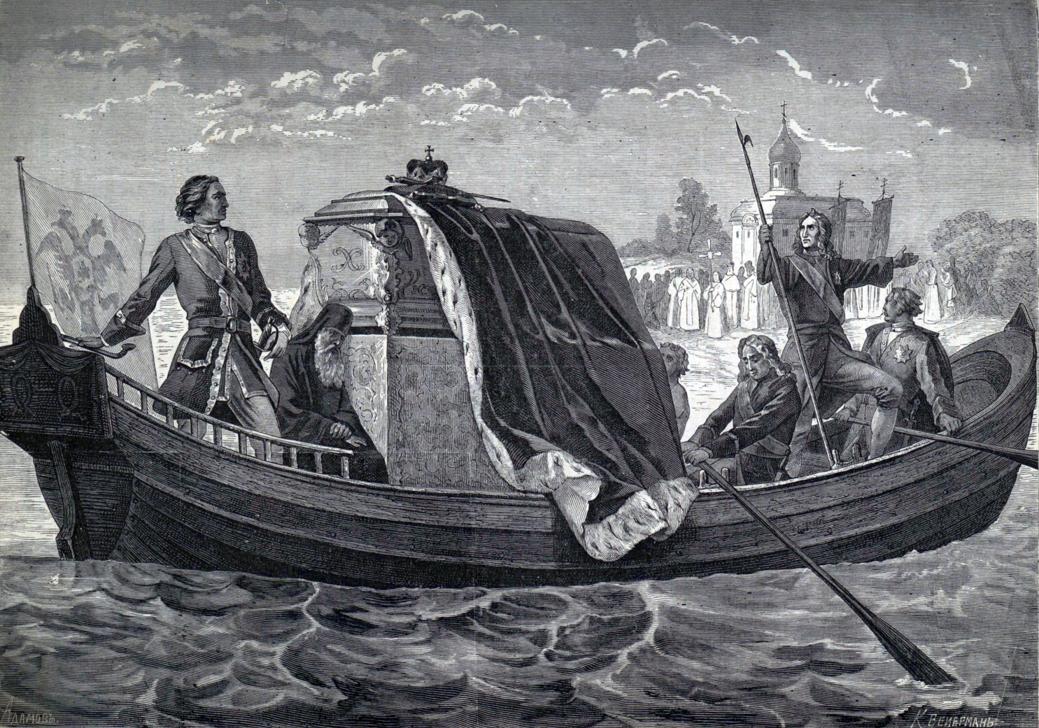 "Перенесение мощей благоверного князя Св. Александра Невского Петром Великим в Петербург". Слева: Пётр Великий; справа: Меньшиков, Апраксин, Ягужинский